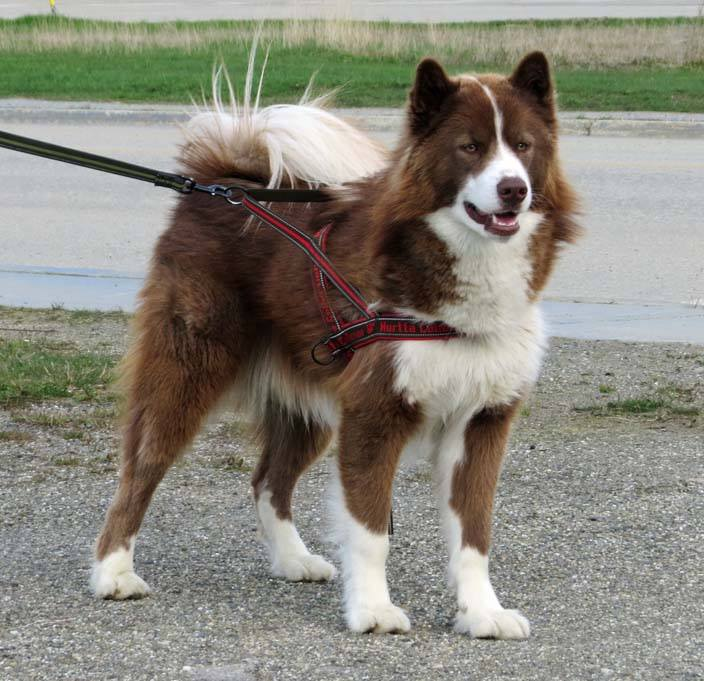 Perro de raza esquimal canadiense, también llamado "Qimmiq".